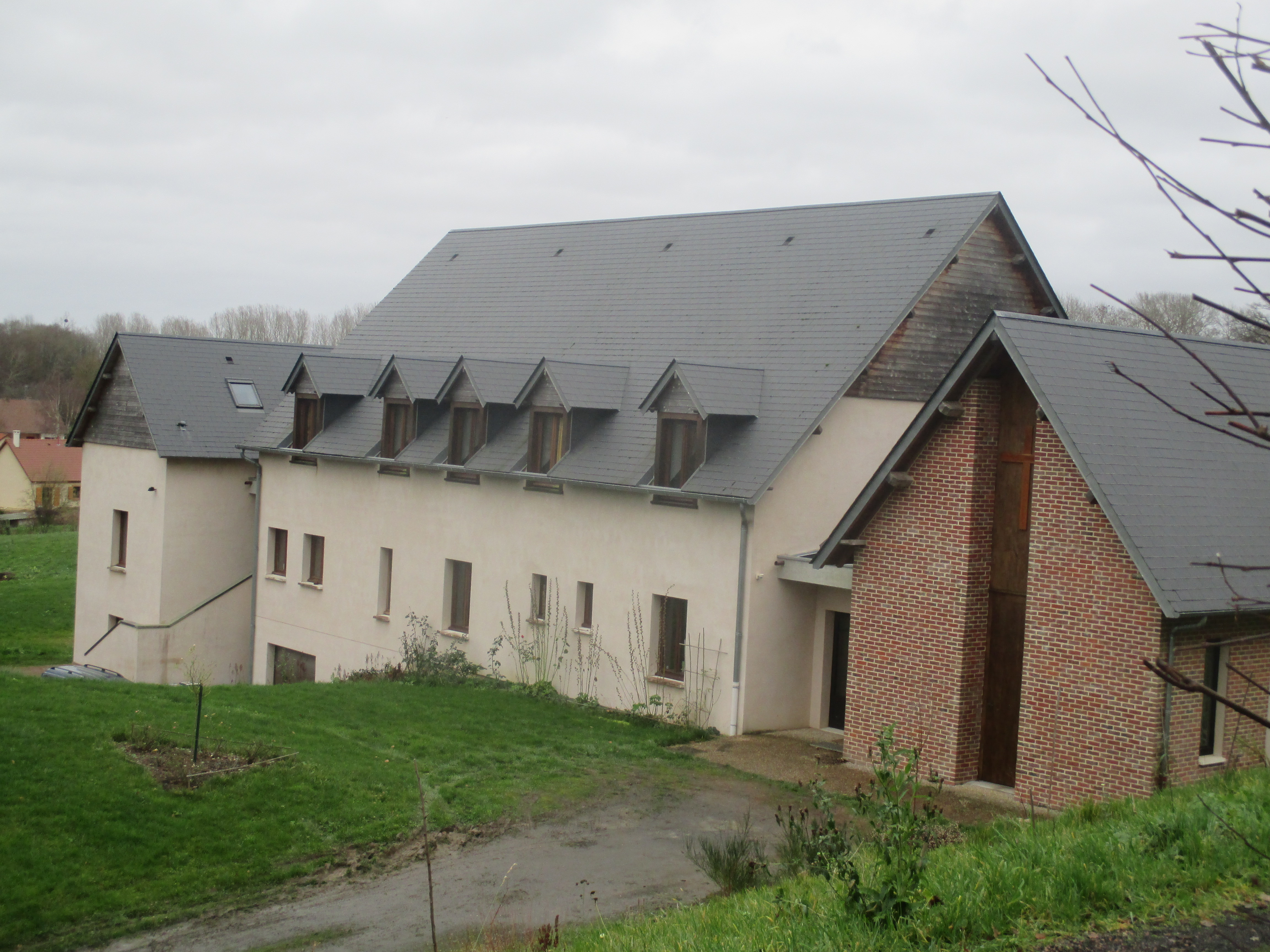 Troussures (Oise): maison des sœurs contemplatives de la Communauté Saint-Jean.